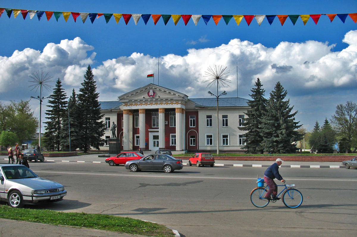 Беларуская (тарашкевіца): Адміністрацыя места Смалявічы